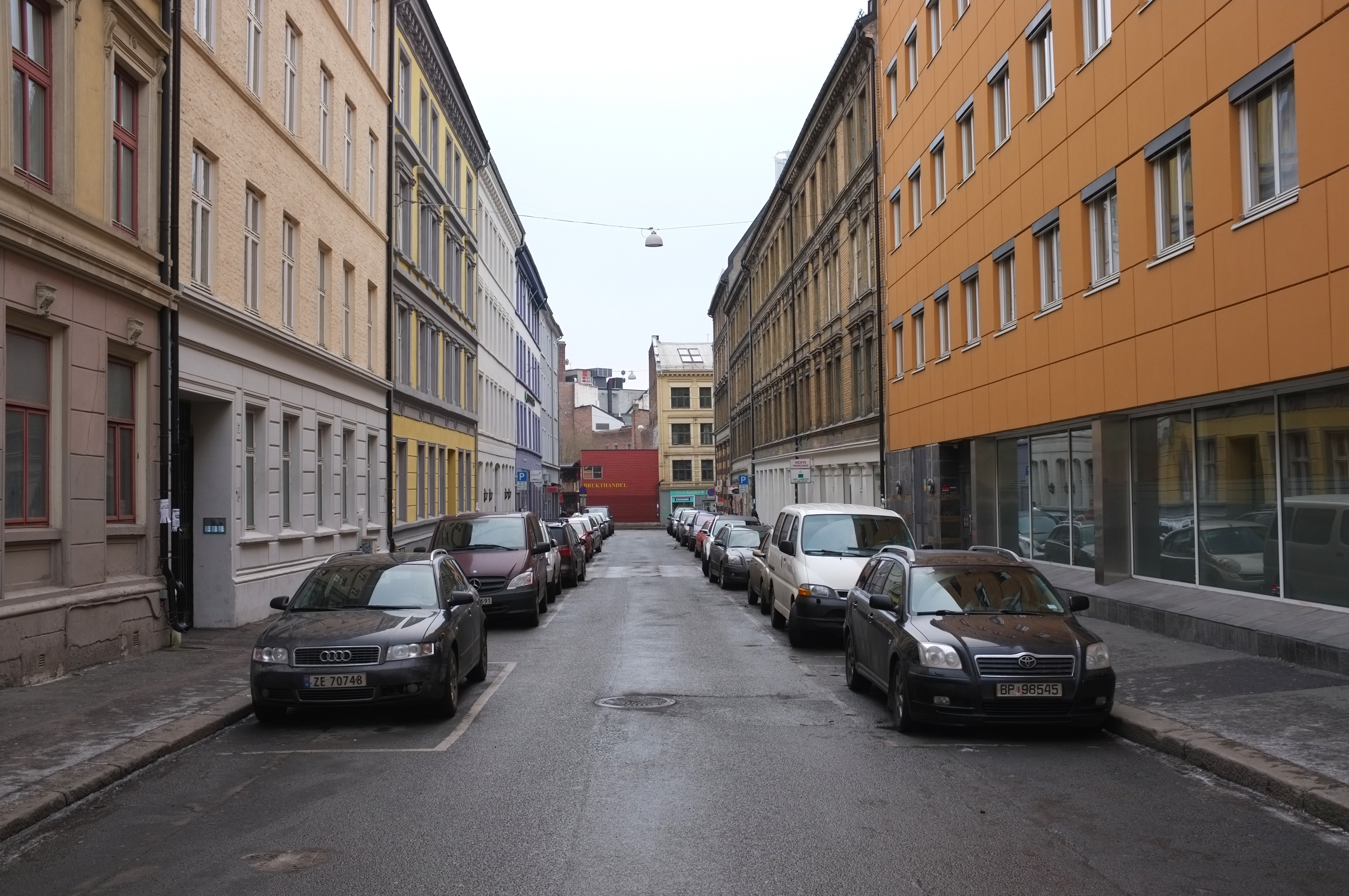 Ebbells gate i Oslo.